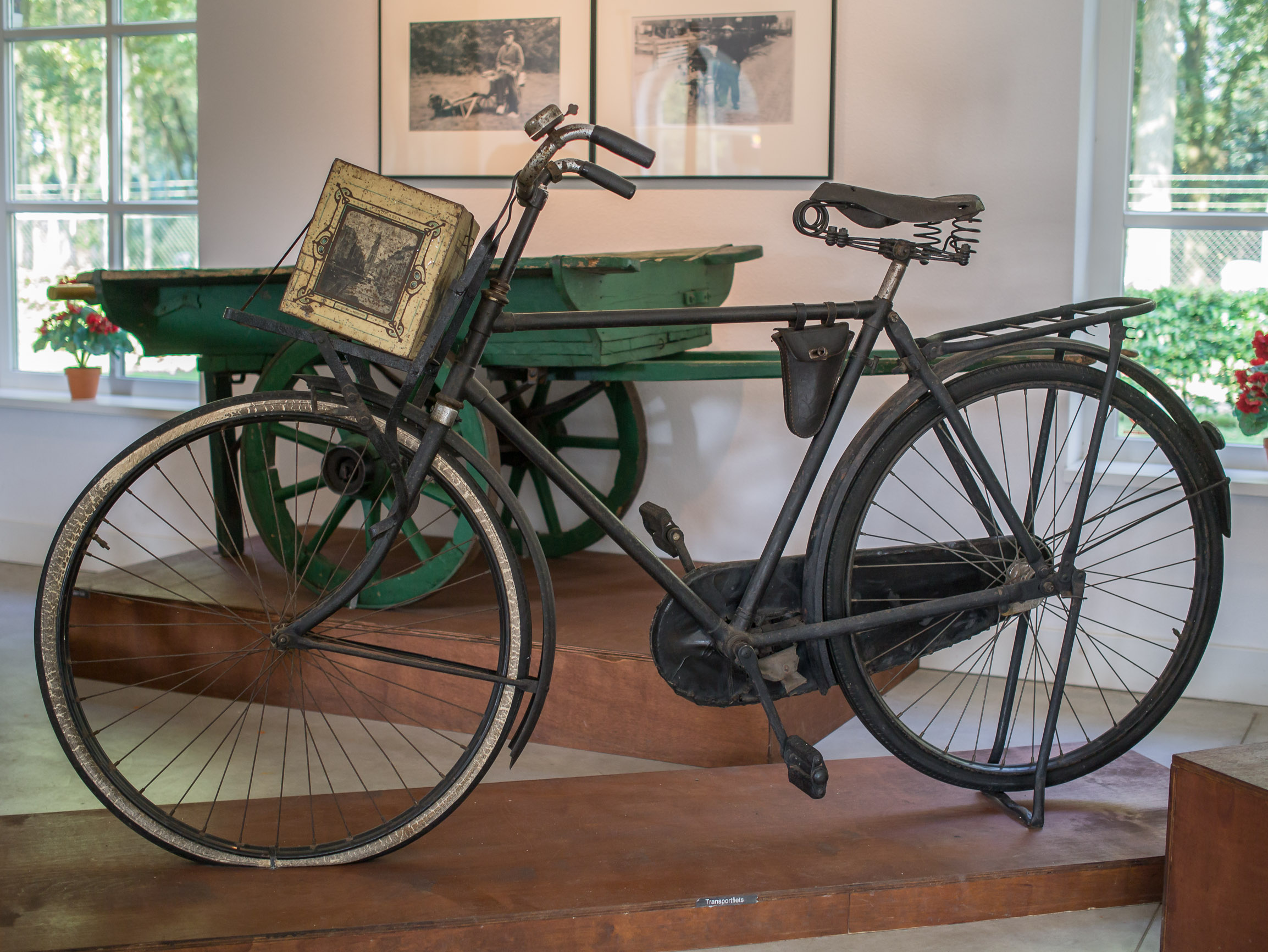 Openluchtmuseum Ellert en Bammert te Schoonoord - Simplex transport fiets